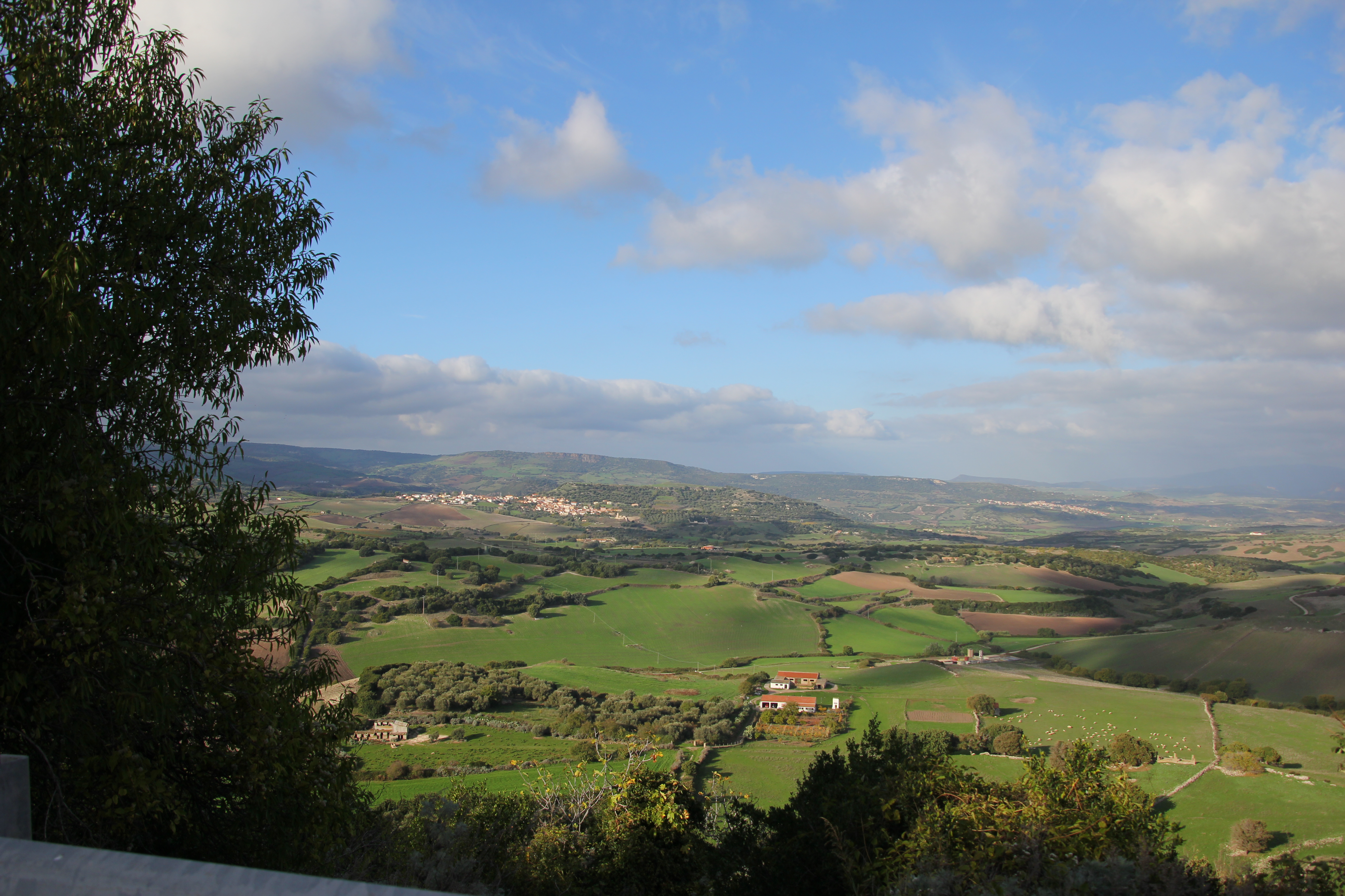 Anglona